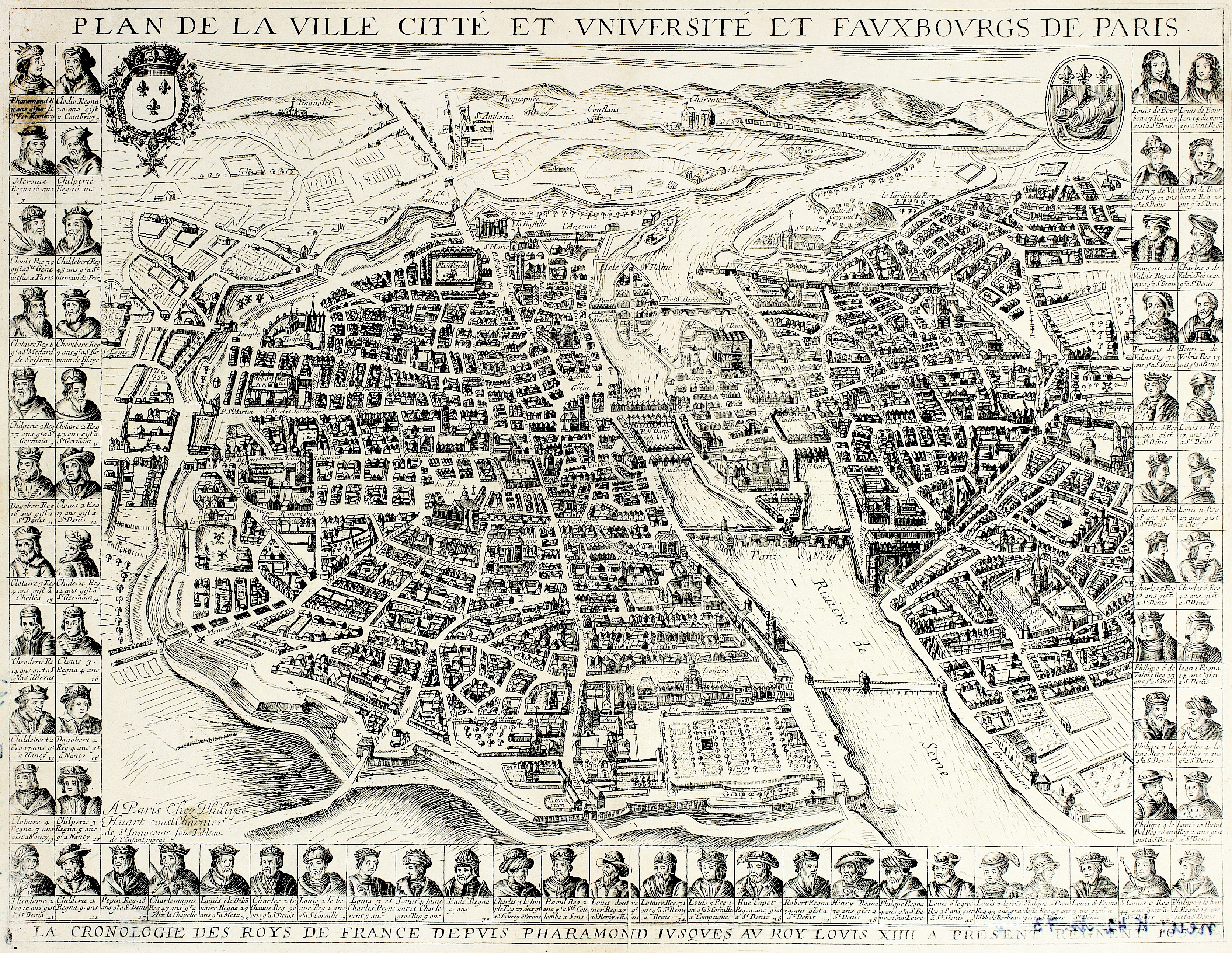 Imitation du plan de Mérian représentant Paris en 1657